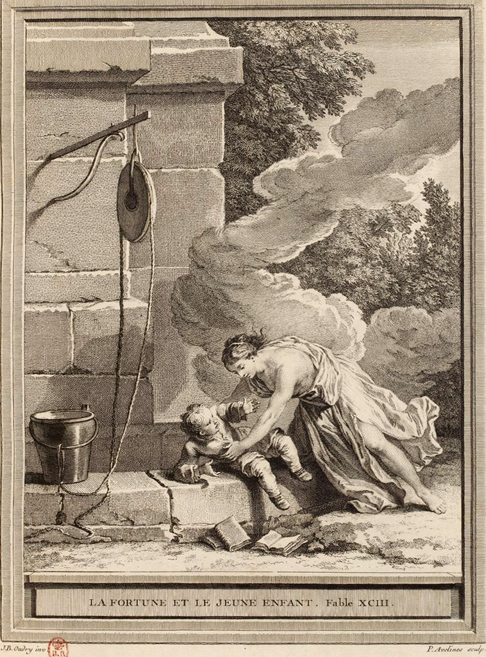 Gravure réalisée par Pierre-Alexandre Aveline d'après un dessin de Jean-Baptiste Oudry représentant la fable La fortune et le jeune enfant de Jean de La Fontaine (fable 11 du livre V). Cette gravure est parue dans l'édition complète des fables de La Fontaine, parue en quatre tomes chez l'éditeur Desaint & Saillant, rue saint Jean de Beauvais à Paris, 1755-1759.